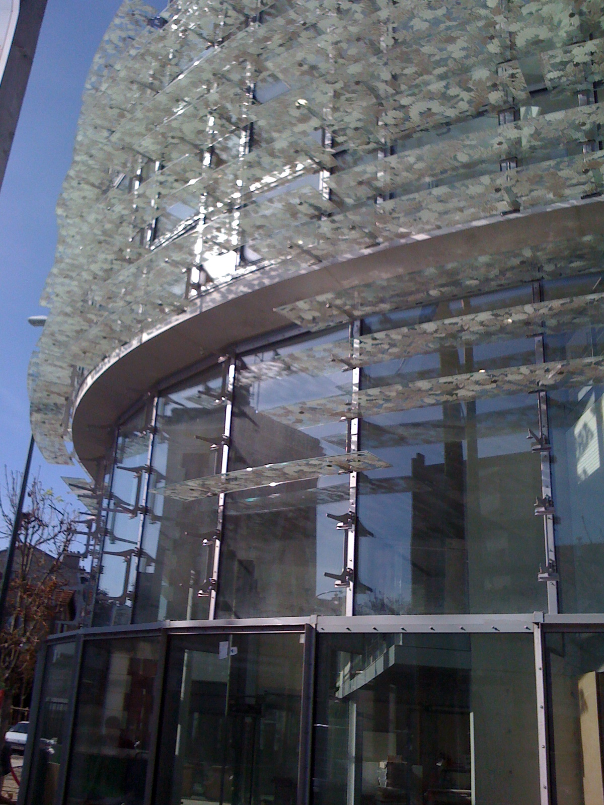 vue de la facade